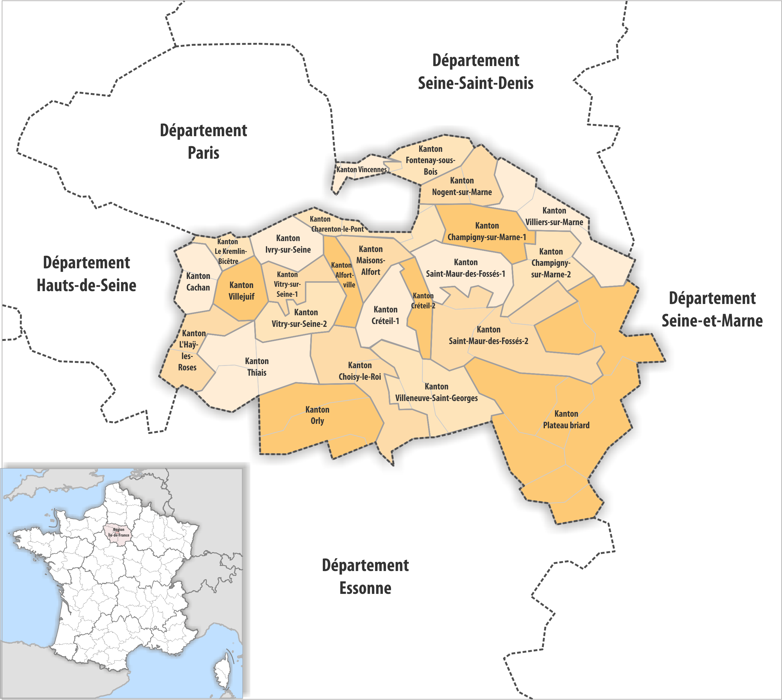 Gemeinden und Kantone im Departement Val-de-Marne